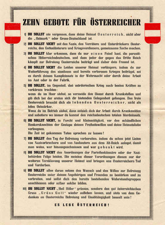 Von der OSS hergestelltes Propagandaflugblatt